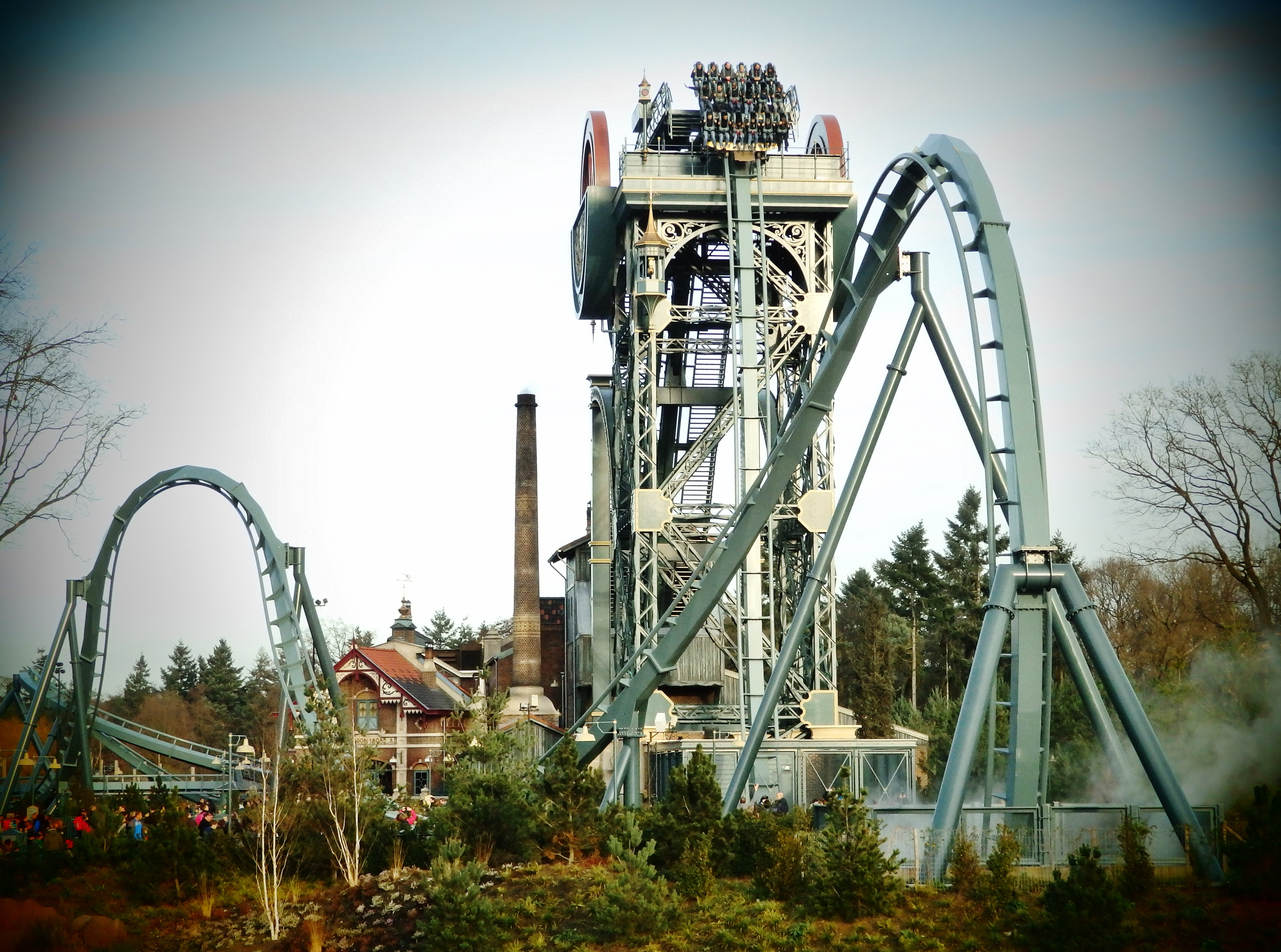 Foto van Baron 1898